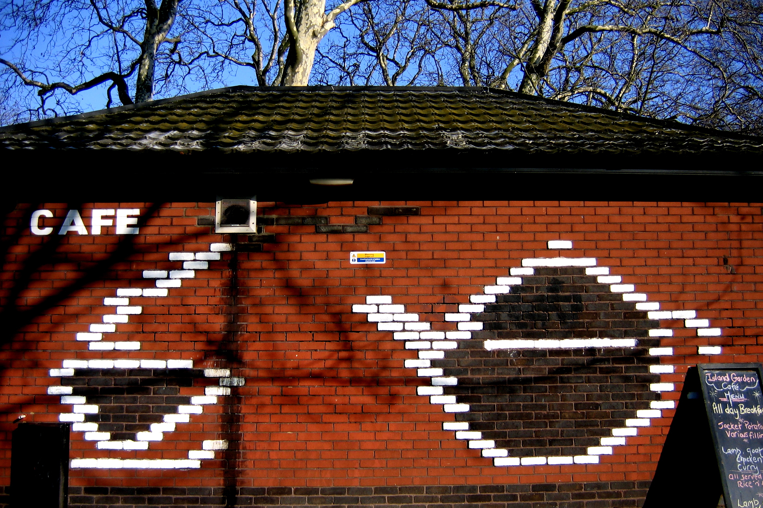 Cafe, Pixels, Bricks